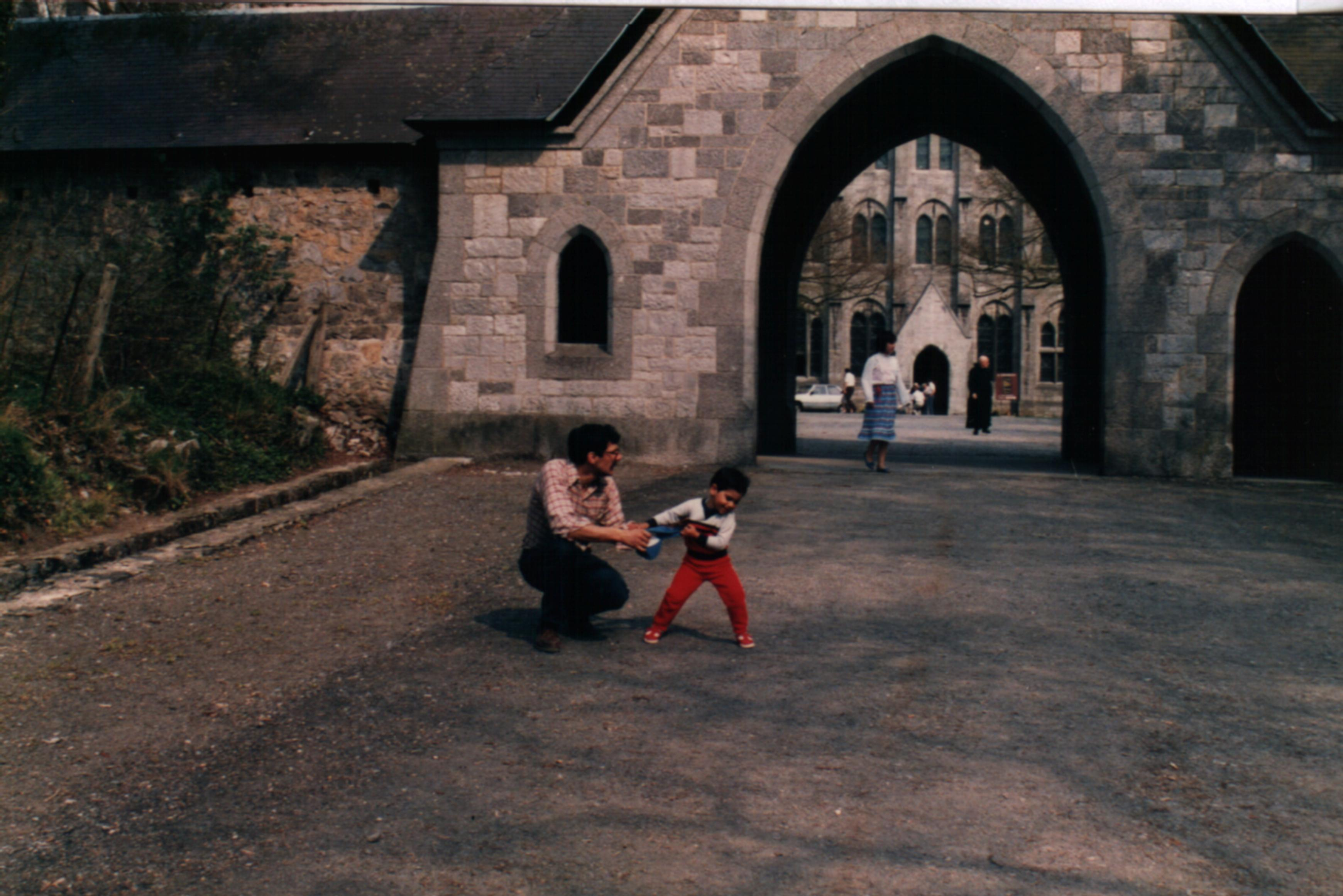 la Abadía del siglo XIX de estilo neogótico está situada en Denée, Provincia de Namur, Bélgica.